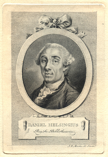 1 grafiskt blad, kopparstick ; 12 x 7.5 cm Etsning föreställande Daniel Helsingius (1717-1774), bibliotekarie och publicist. Konstnär: J. F. Martin